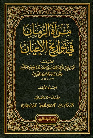 الكتاب من تصنيف سبط ابن الجوزي.